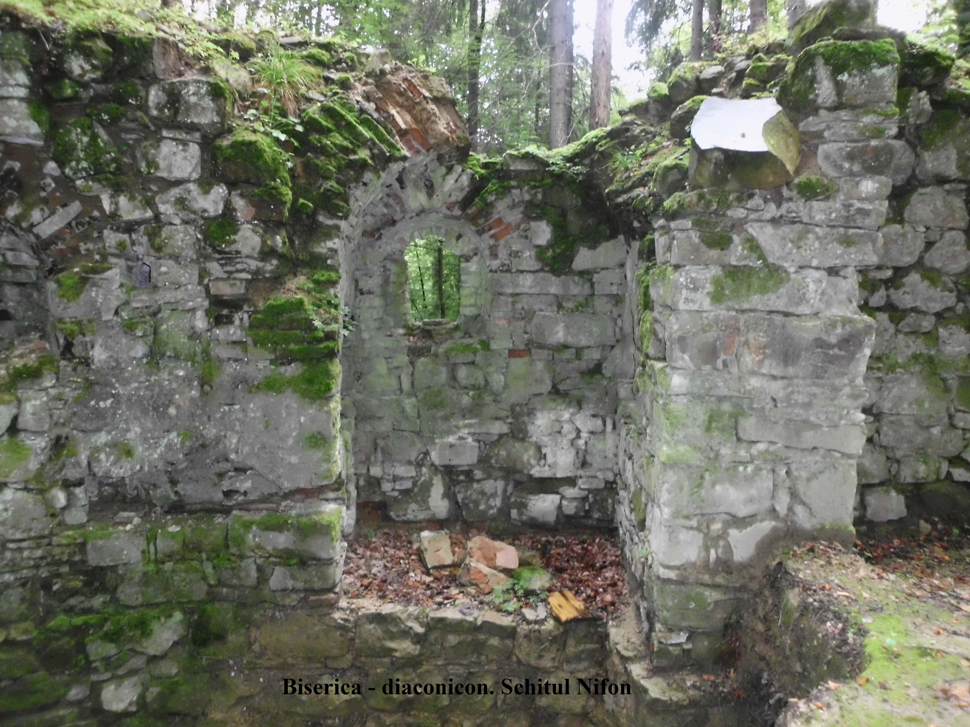 Situl arheologic Schitul lui Nifon Aceasta este o imagine cu un sit arheologic din România, clasificat cu numărul 125043.04.02.